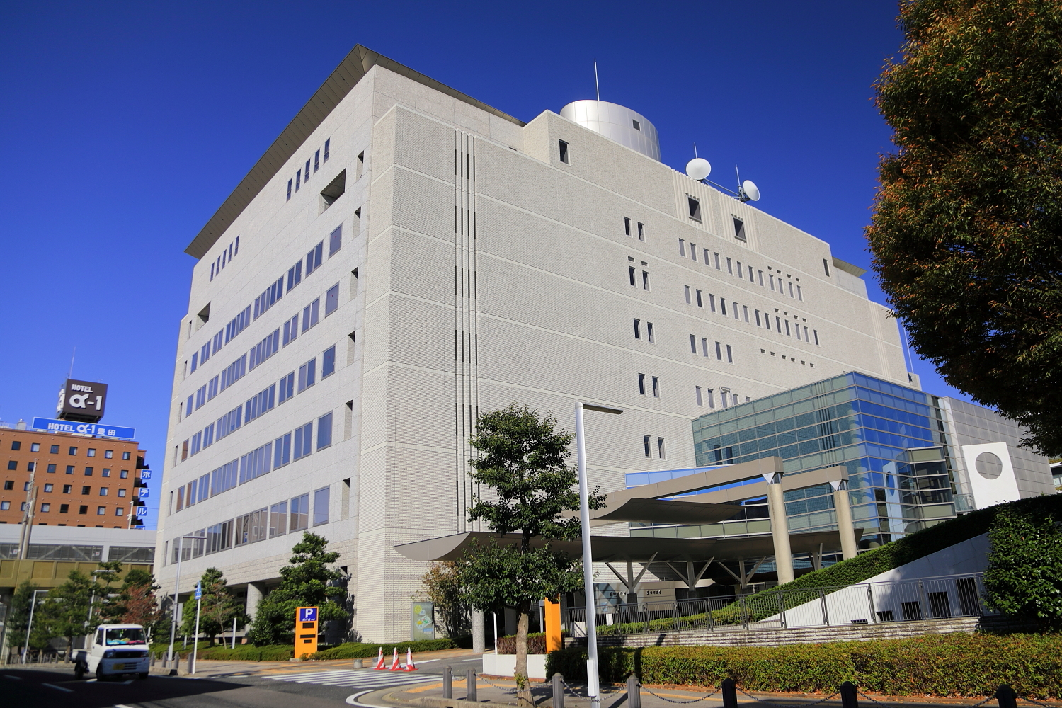 豊田市役所南庁舎外観（豊田市、2018年（平成30年）10月）